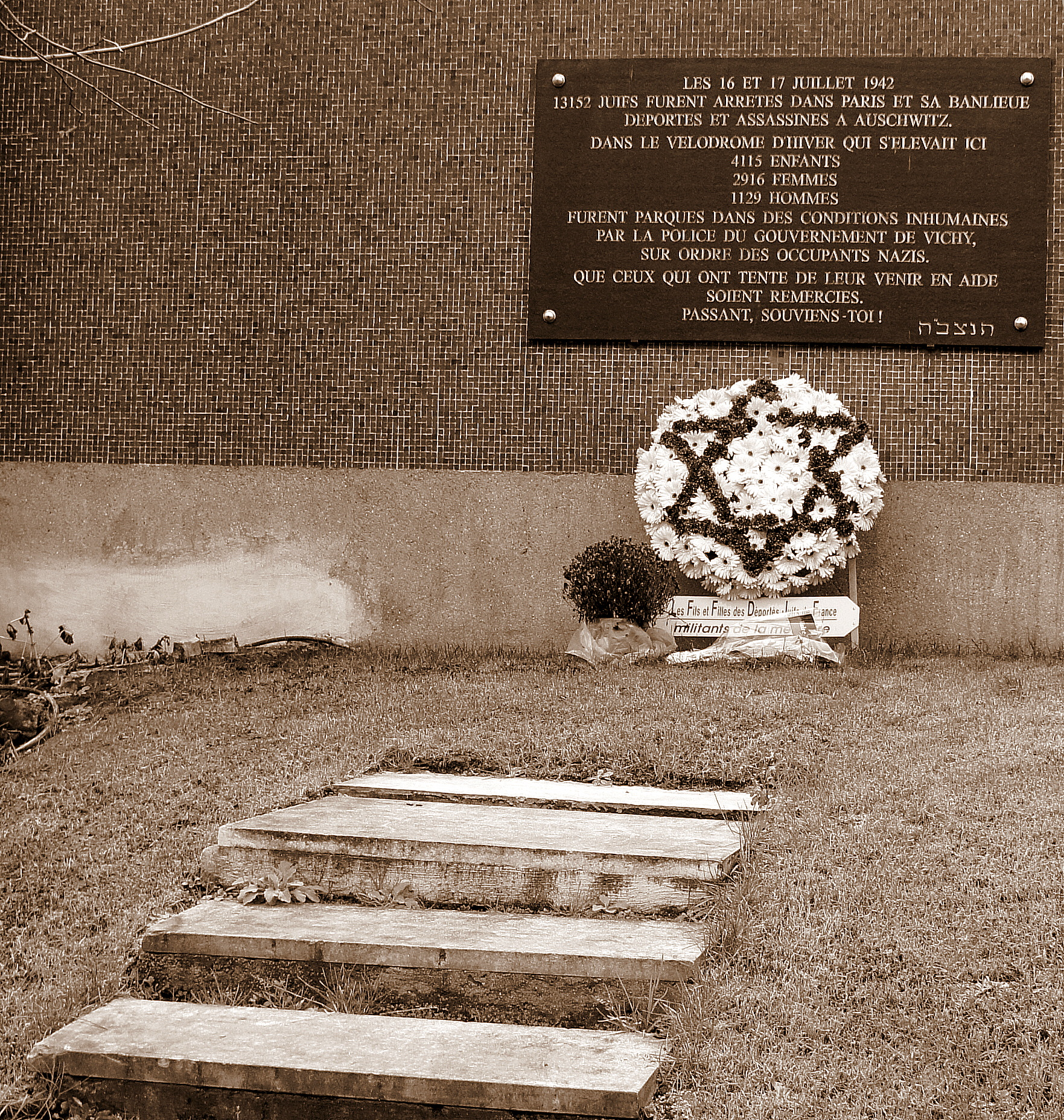 monument commémoratif près du métro Bir Hakeim